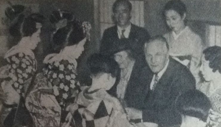 1936年の訪日時のフョードル・シャリアピン